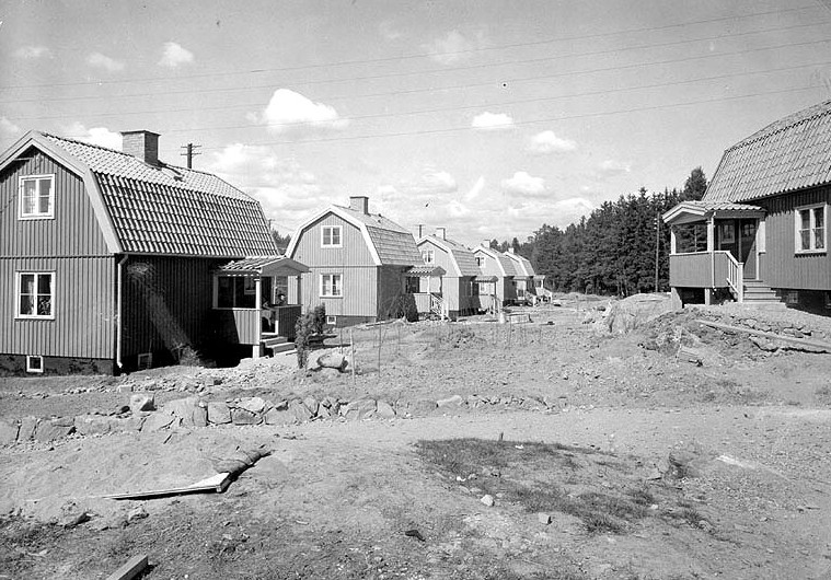 Olovslunds småstugeområde på Stugvägen under byggnad 1928. Vy från norr mot söder. Husen till vänster ligger på Stugvägen i kv. "Bokhyllan" och husen till höger ligger på Stugvägen i kv. "Skåpet".